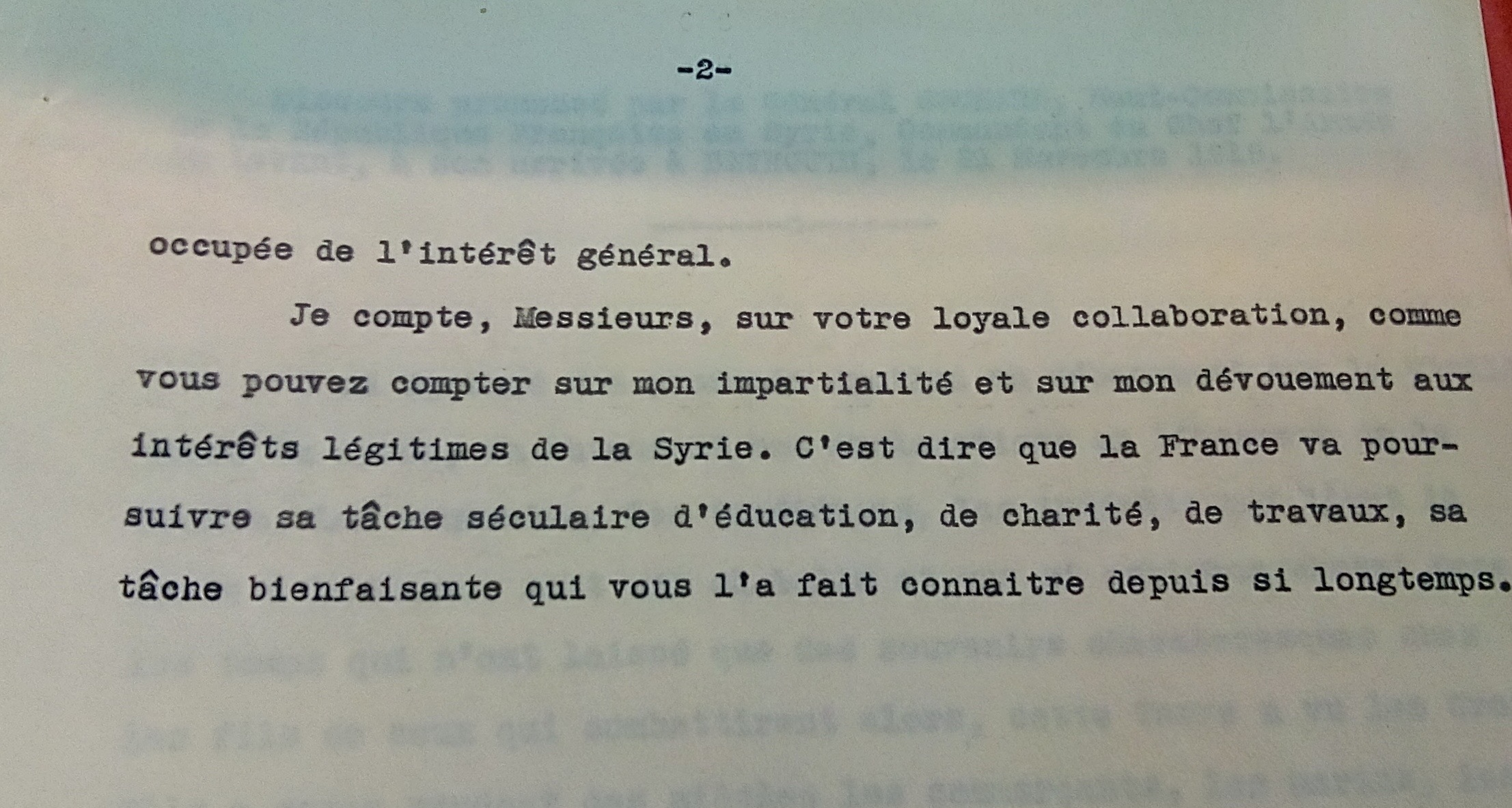 Version officielle du Discours de Gouraud lors de son arraivée à Beyrouth. Archives de la Courneuve (Fonds Gouraud, 399 PAAP/151) Suite et fin.